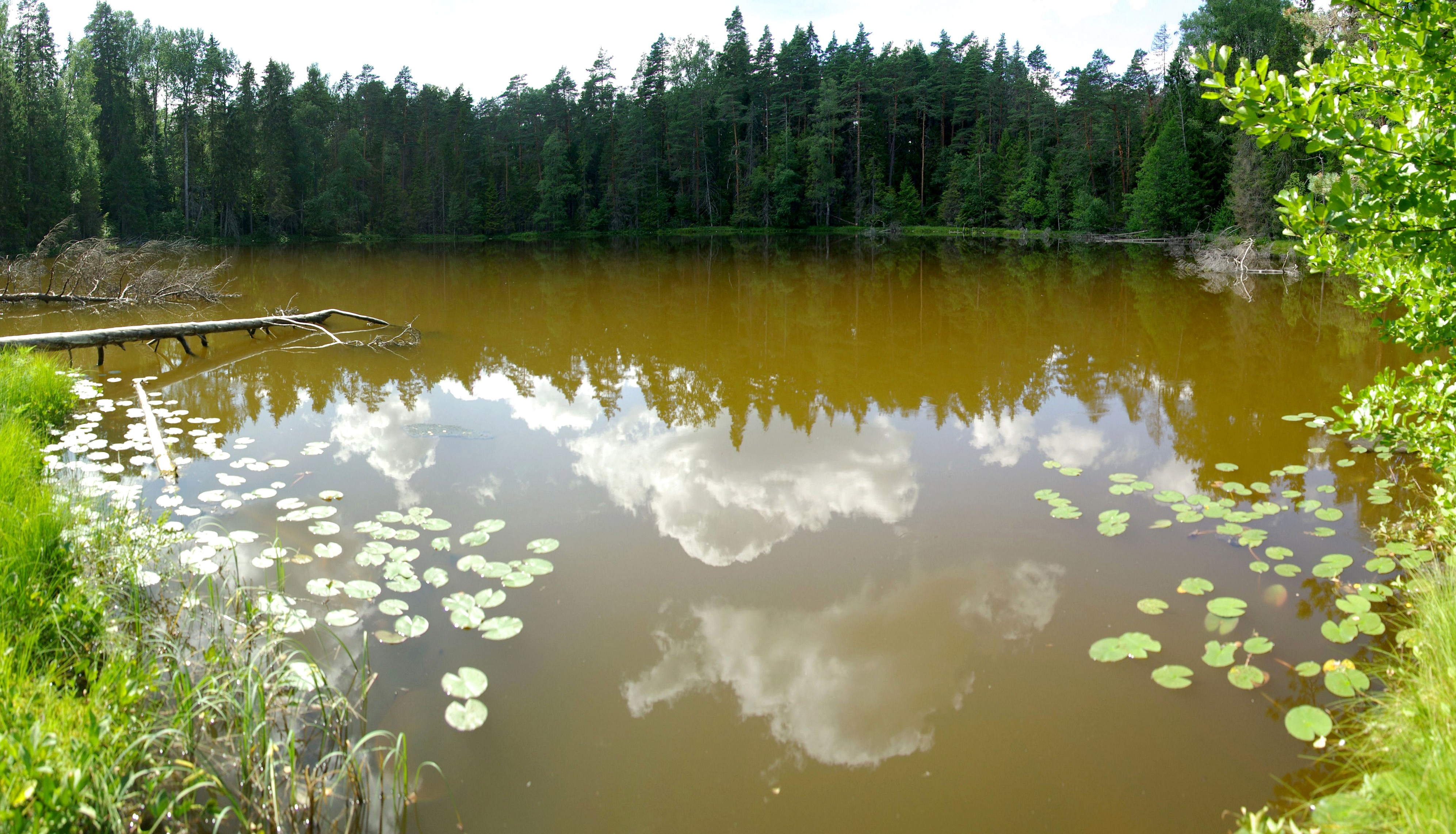 Järv Harju maakonnas Aegviidu vallas, üks Nelijärve järvedest.